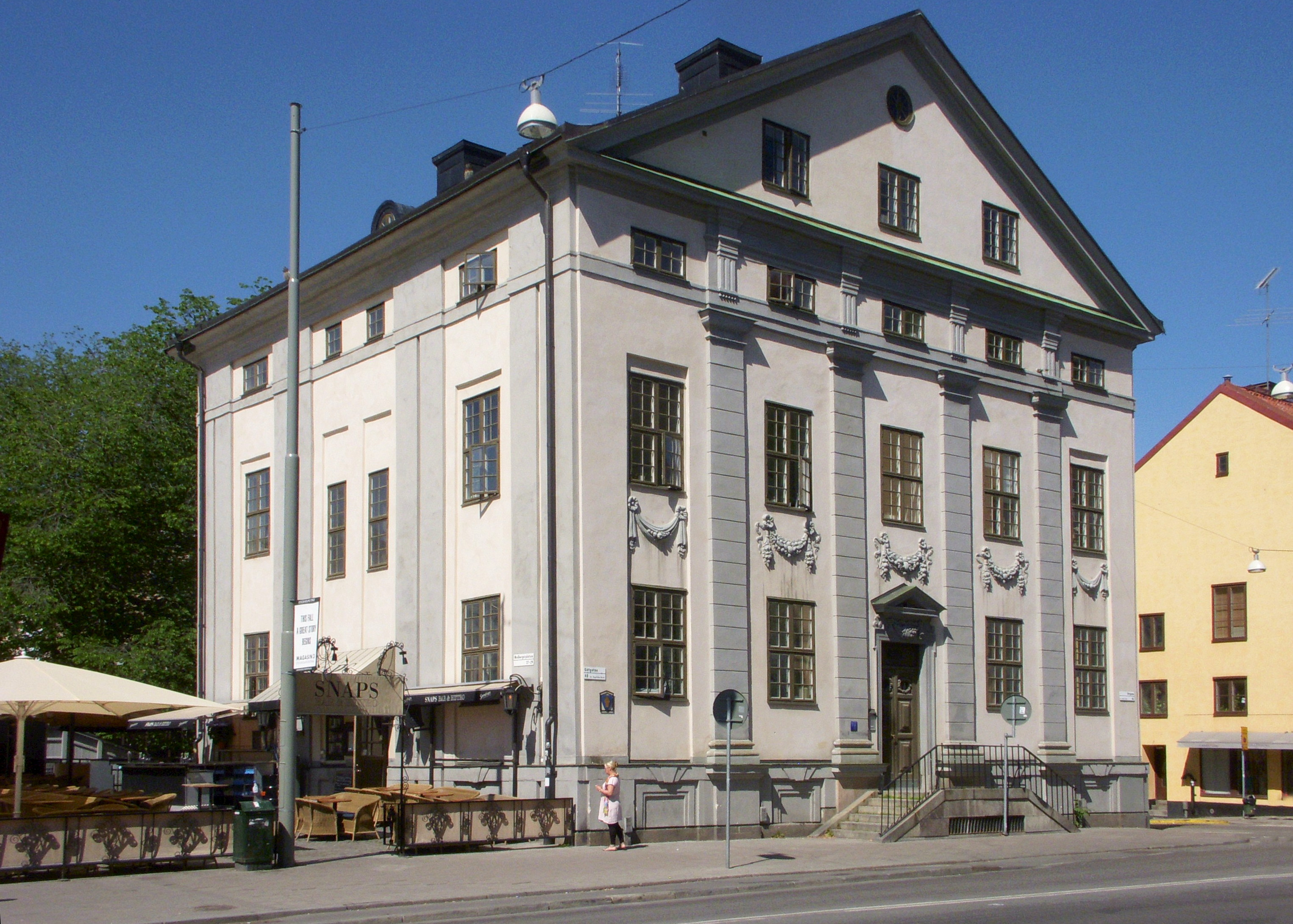 Lillienhoffska palatse på Södermal, Stockholm